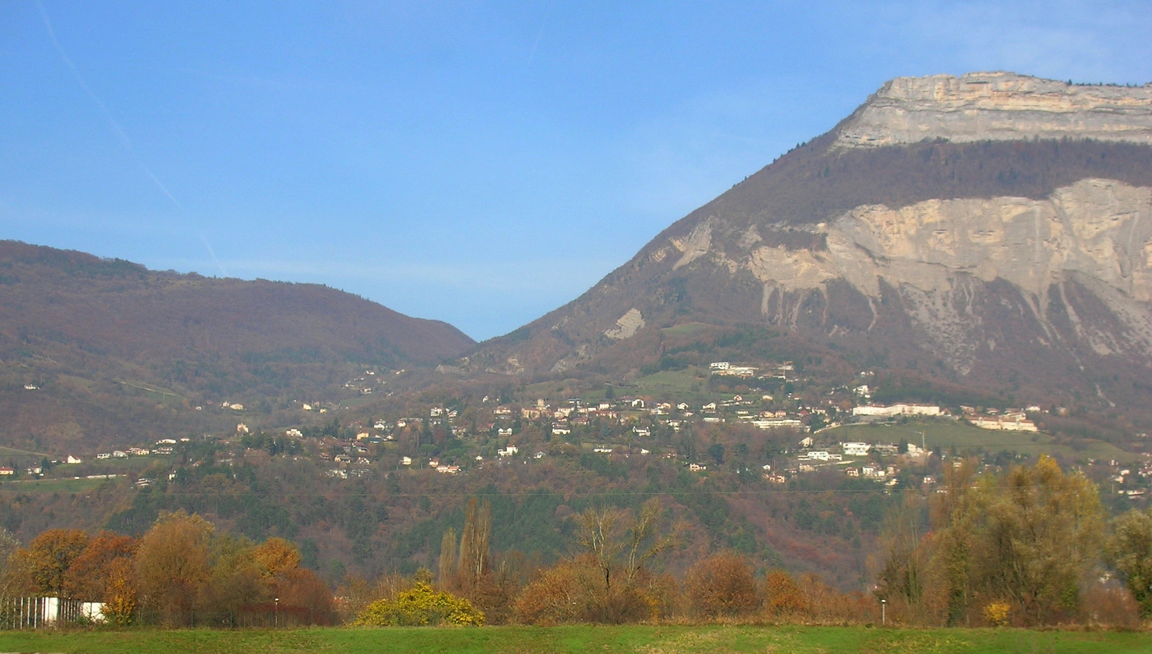 Panorama de Corenc vue du parc de l'Ile d'Amour.